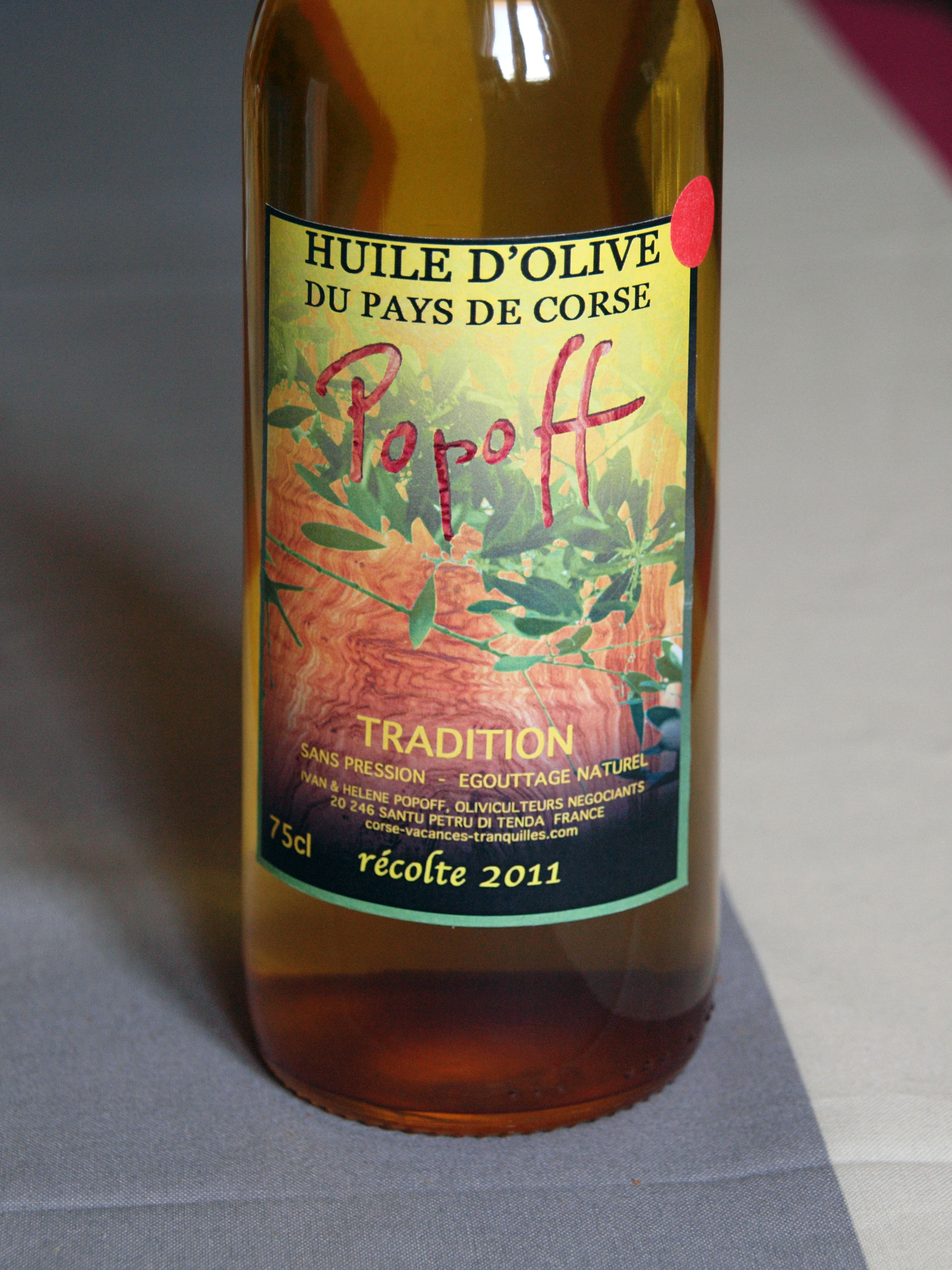 Santo-Pietro-di-Tenda, Nebbio (Corse) - Huile d'olive produite artisanalement par Popoff, descendant d'émigré russe ayant fui le bolchévisme en 1921